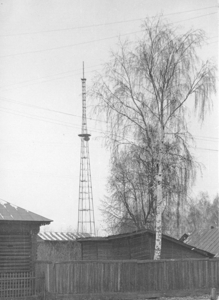 Телебашня Иваново. 1960 год. Место съемки: район ул. Боевиков. Фото предоставлено Садковым Д.В.